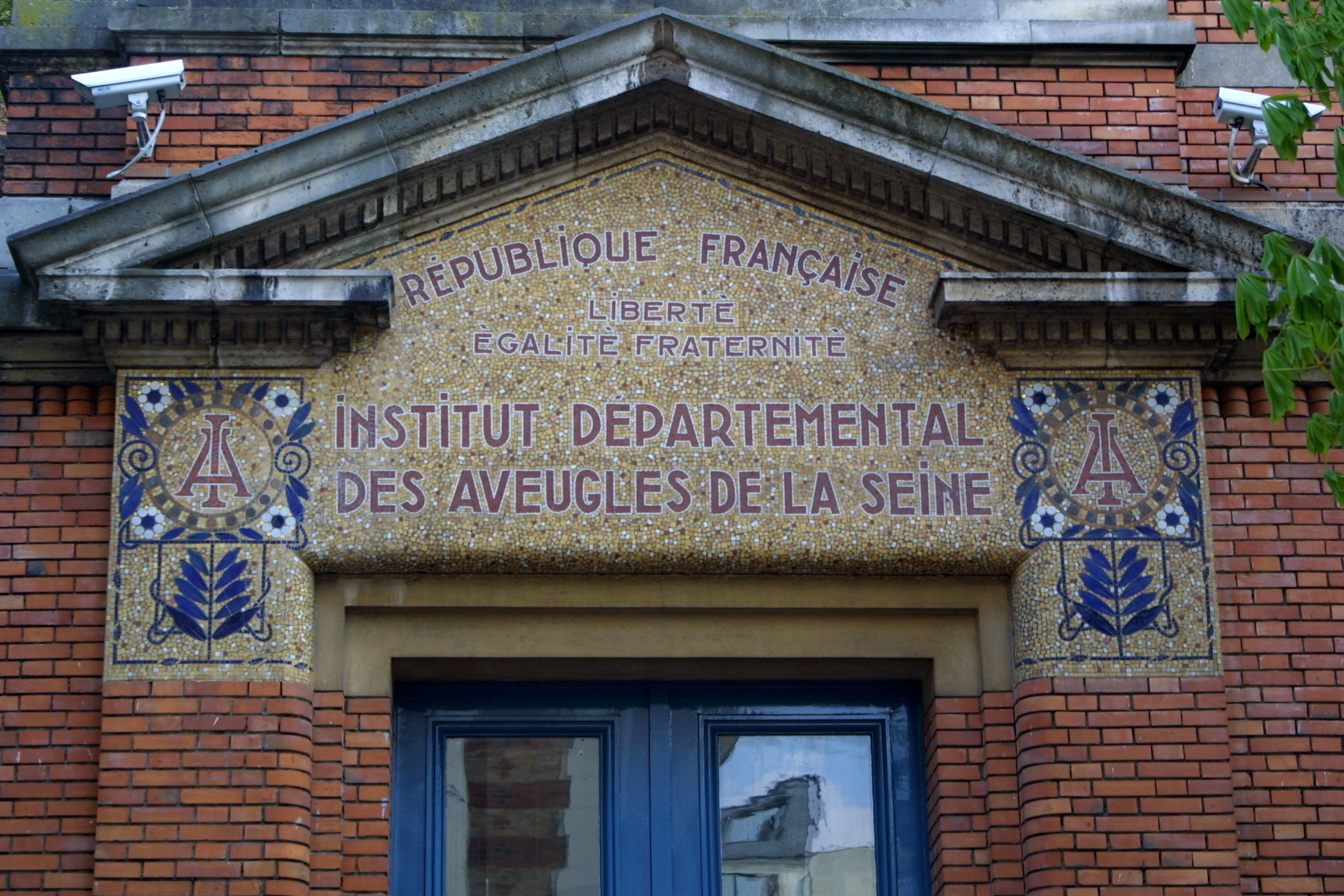 L'ancien Institut départemental des aveugles de la Seine, à Saint-Mandé